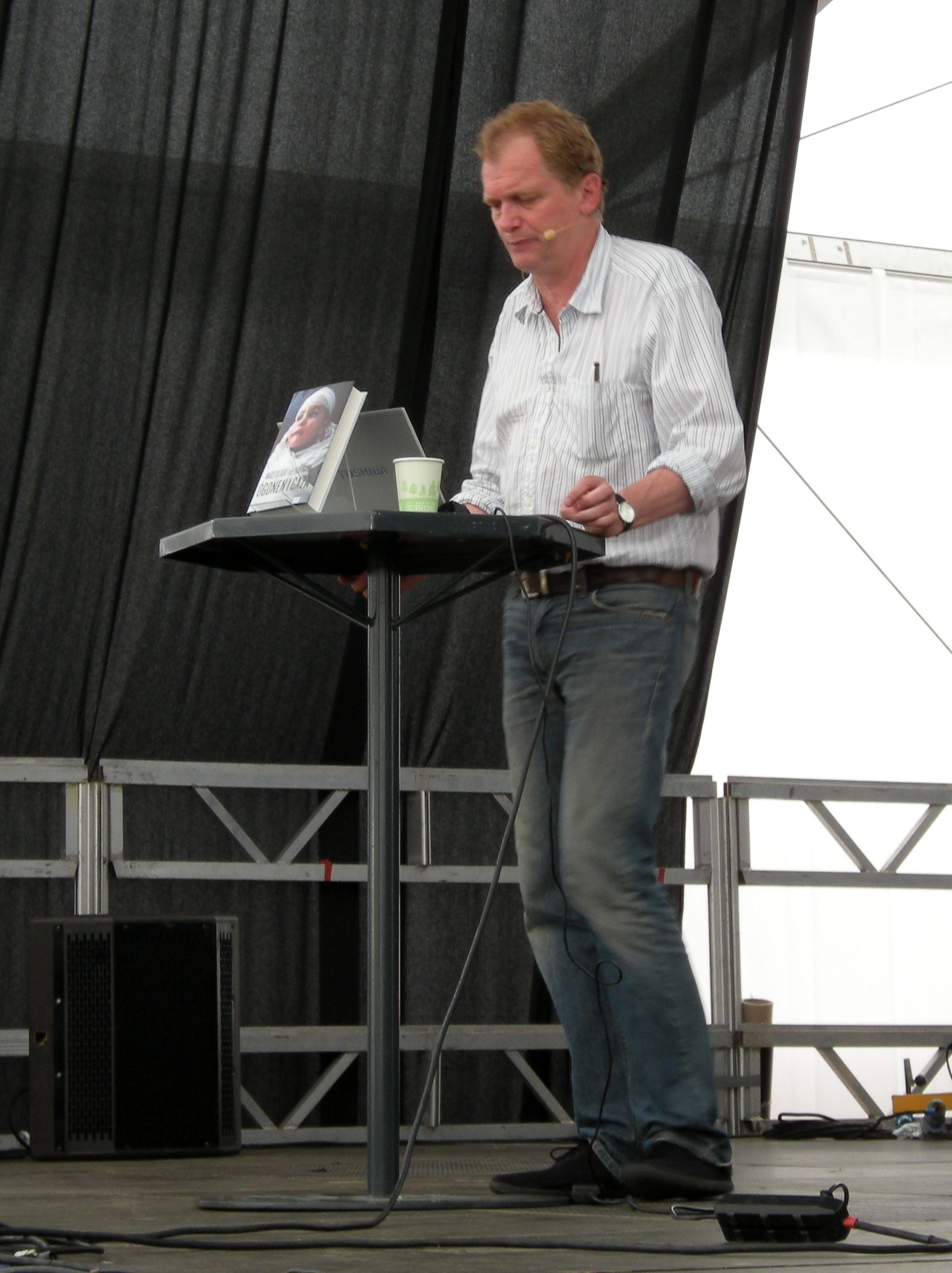 Norske läkaren Erik Fosse håller föredrag på Peace and Love i Borlänge